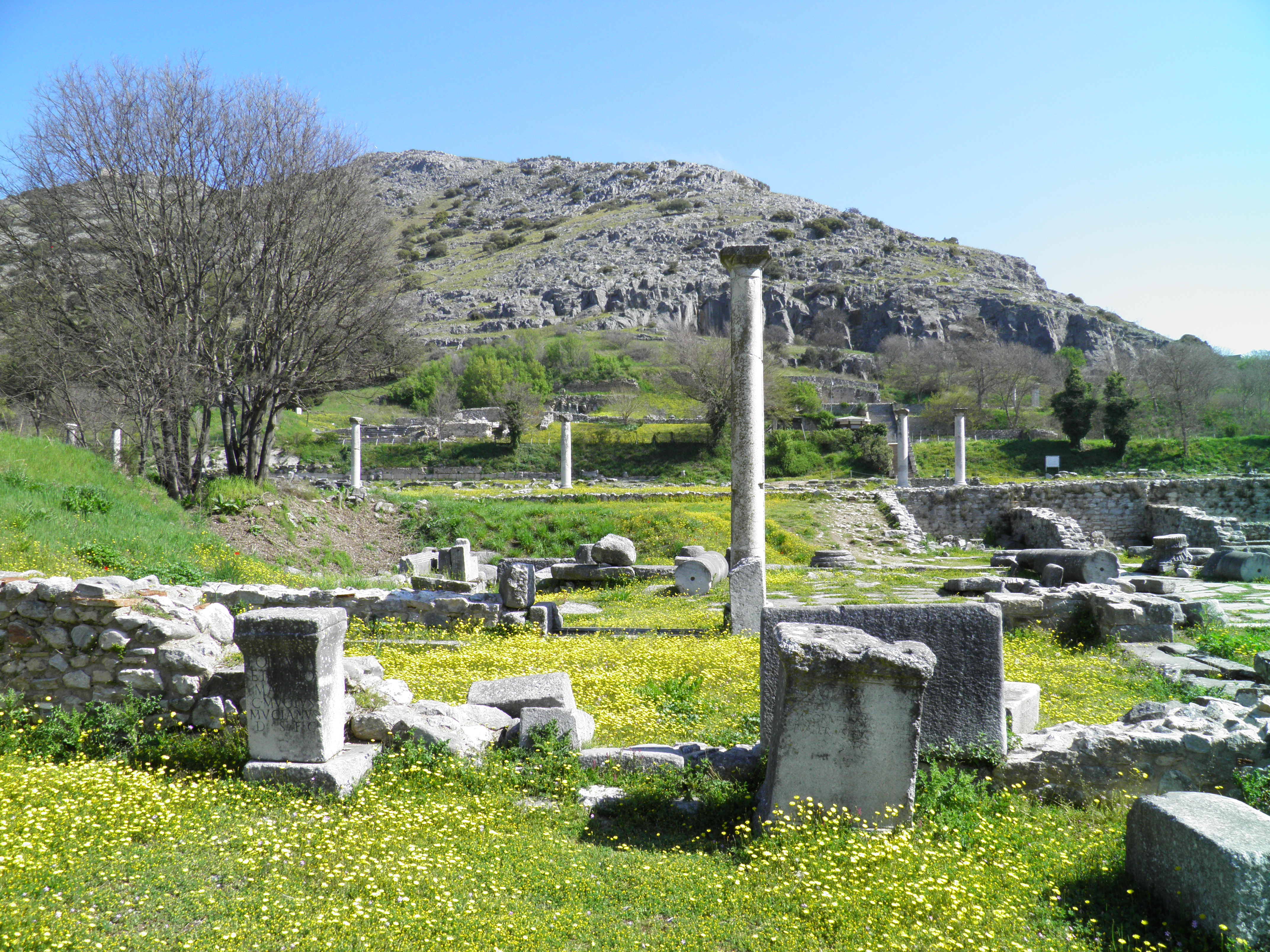 Philippi